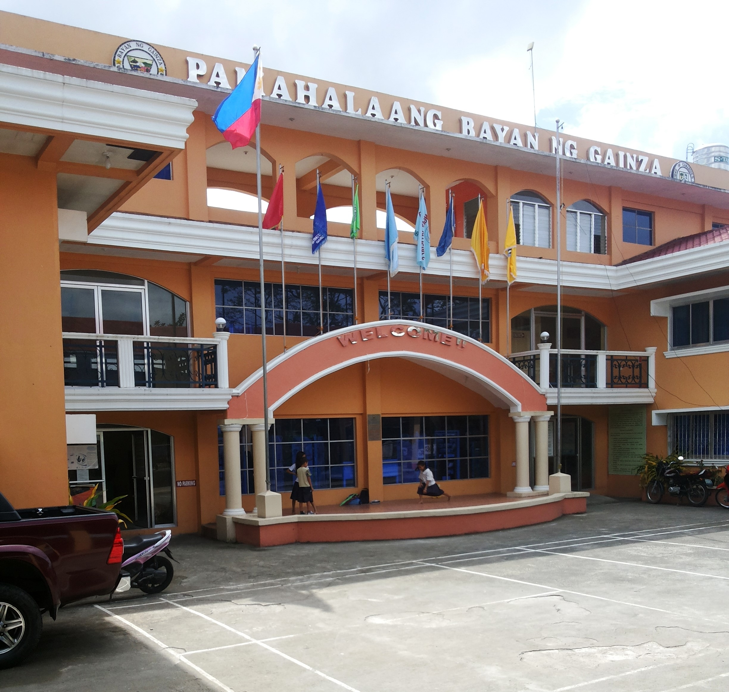 Gainza, Camarines Sur, Philippines